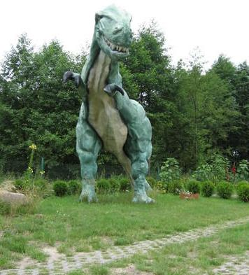 Dinozaur. Rzeźba ze steropianu we wsi Gredele.